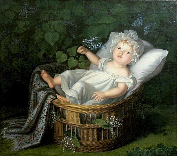 Prinses Marianne van Oranje-Nassau (1811)